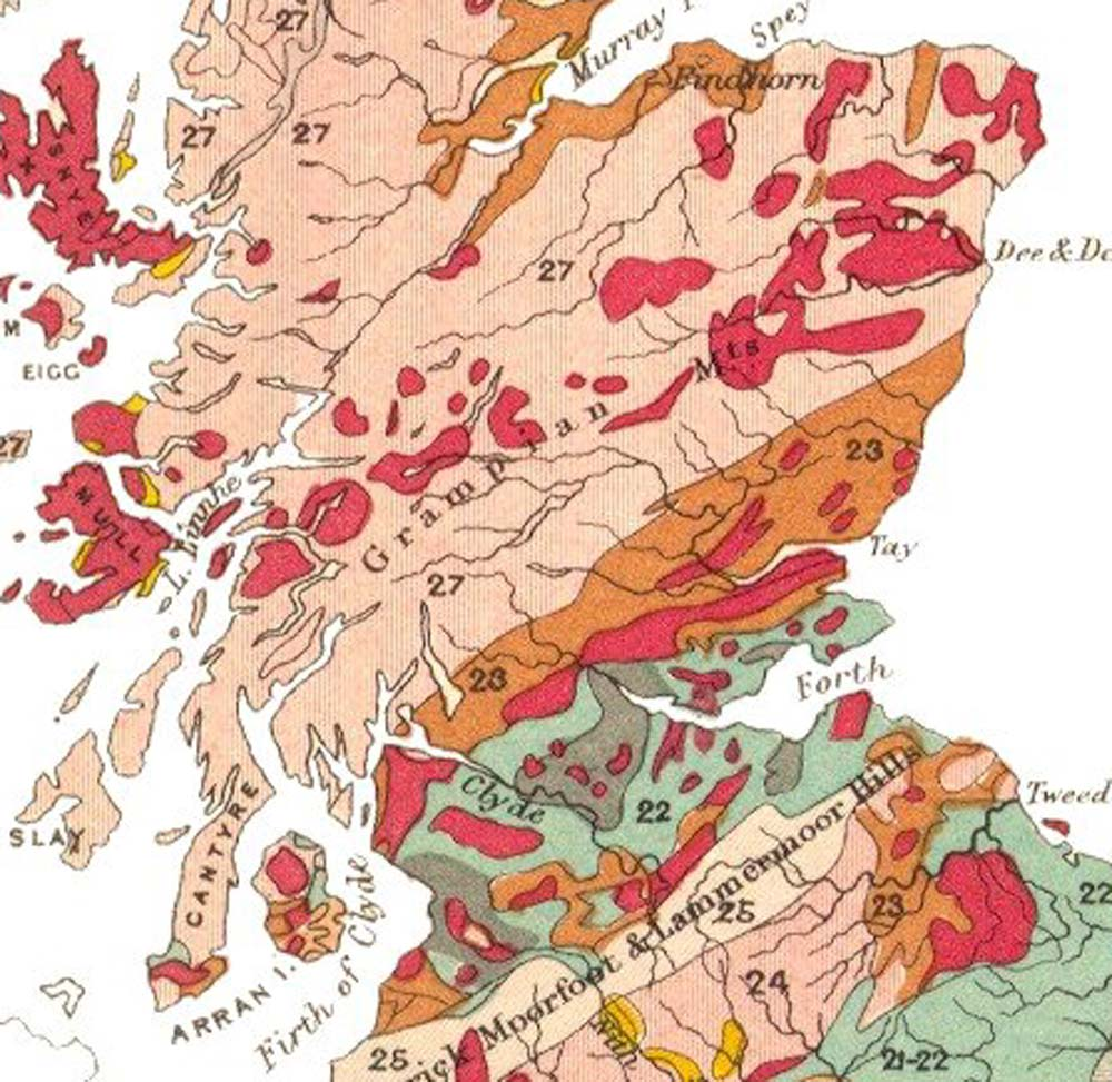 Scotland, central (geological map)